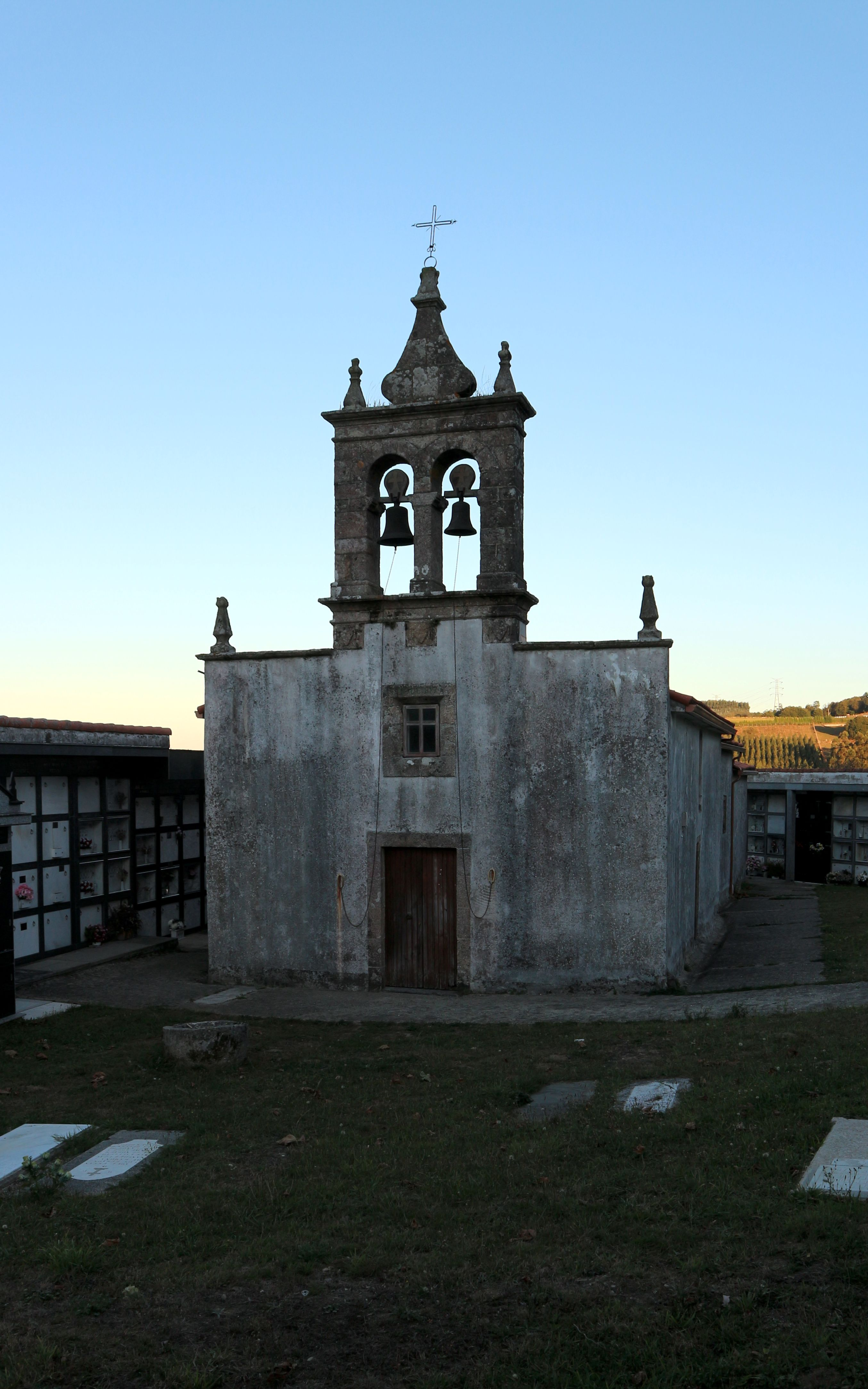 Igrexa de San Miguel de Filgueira de Traba, Oza-Cesuras.